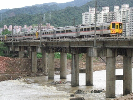 台鐵DR3100型暖暖～四腳亭第一基隆河橋 was filmed by TDCKW on 20050813